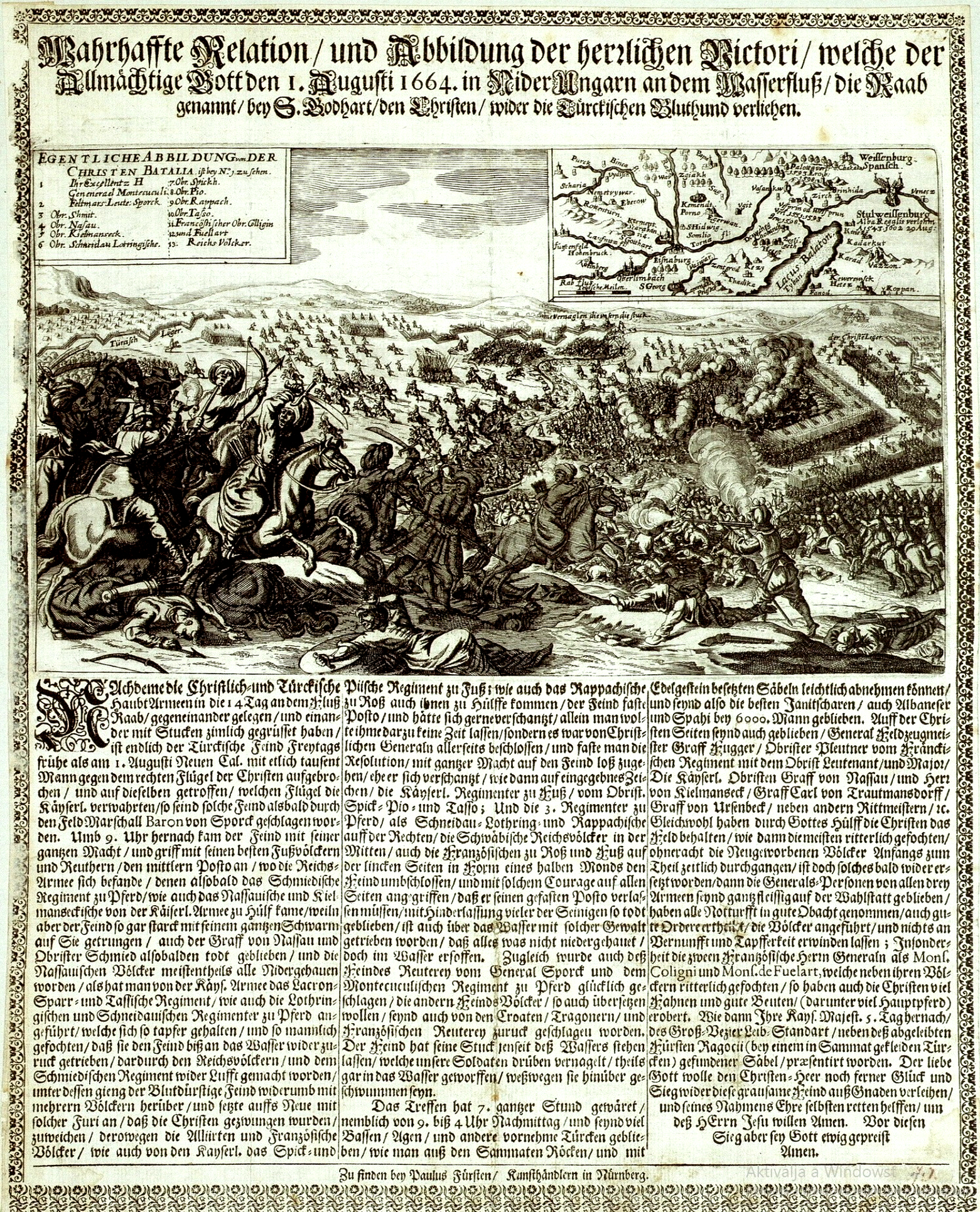 Kupferstich mit Abbildung und Beschreibung der Schlacht der kaiserlichen Truppen unter Feldmarschall Montecuculi gegen die Türken bei St. Gotthart (Szentgotthard) / Mogersdorf an der Raab, am 1. August 1664